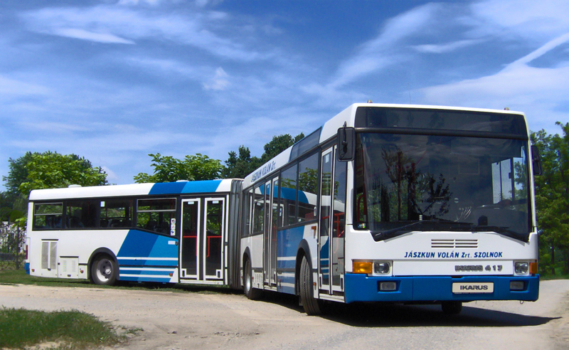 Ikarus 417.04 ex-WSW (Szolnok?)